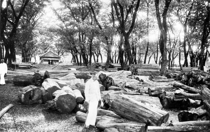 Repronegatief. Stapelplaats djati-hout, Pati, Midden Java